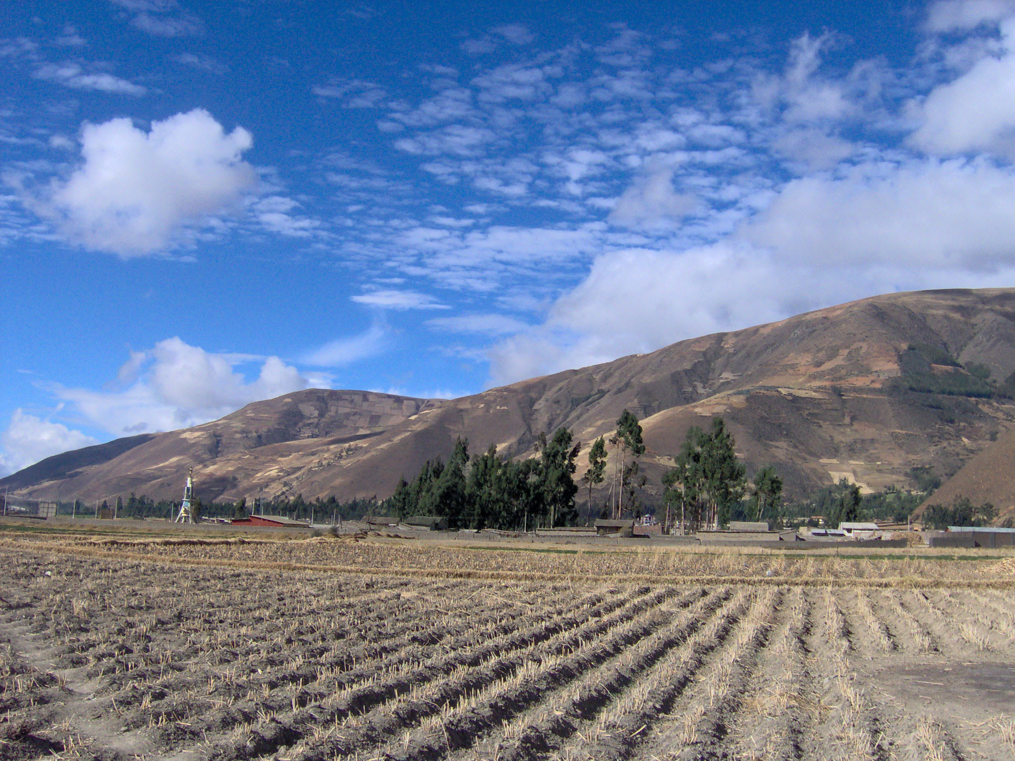 Campo luego de la cosecha en la ciudad de Pampas-Tayacaja.